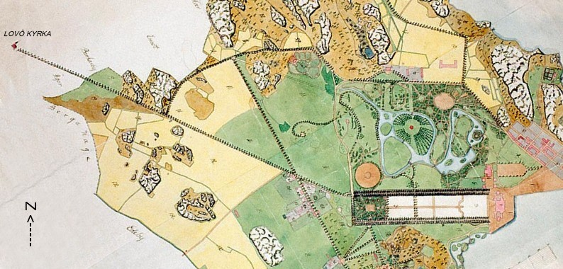 Karta över Drottningholms slottsområde, slutet av 1700-talet. Del av karta med nuvarande Lovö kyrkallé. Kartan uträttad med norr uppåt.